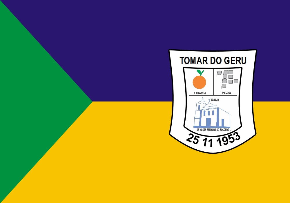 Bandeira Municipal de Tomar do Geru